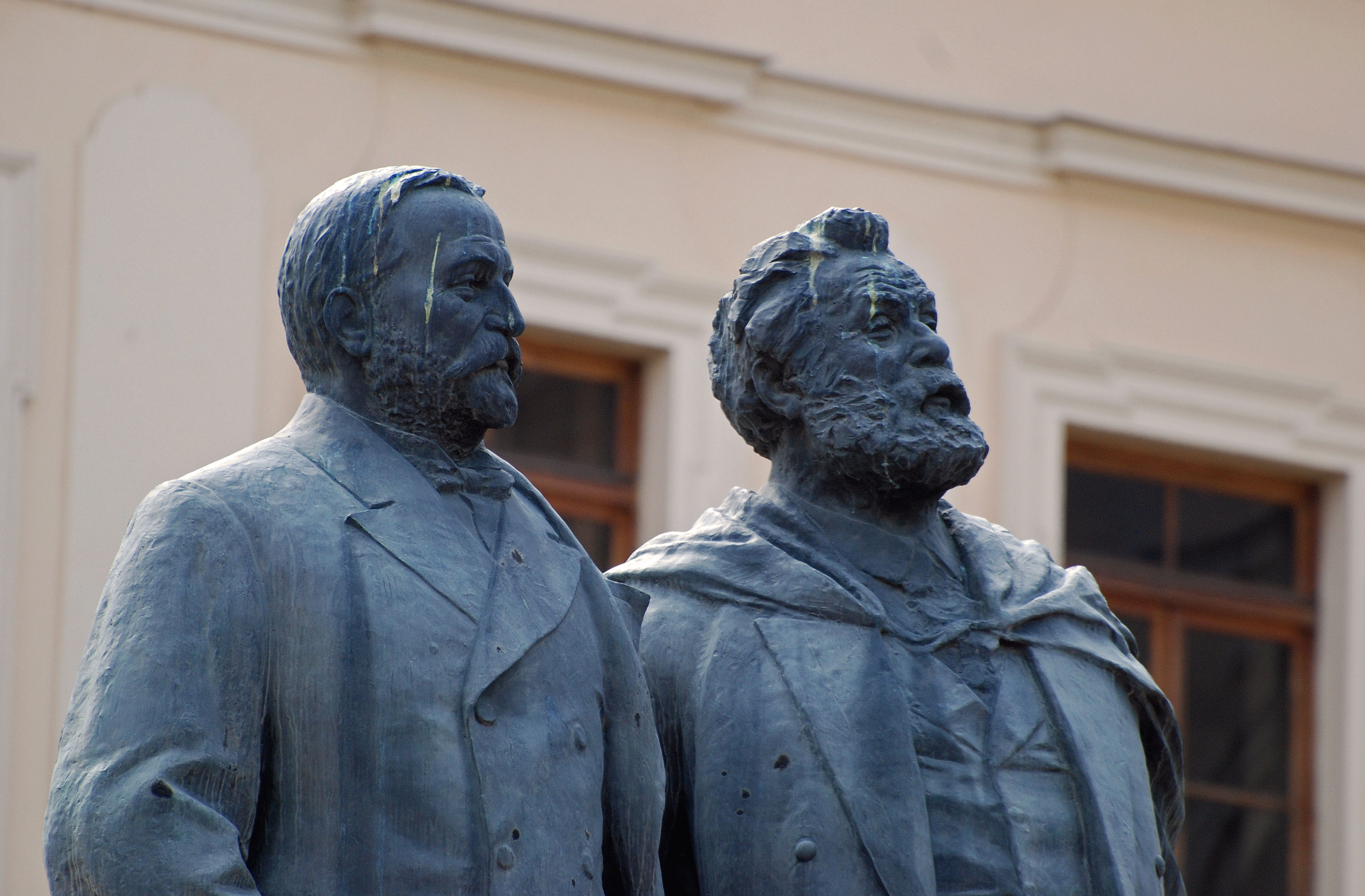 Ilia Chavchavadze and Akaki Tsereteli Statue in Tbilisi